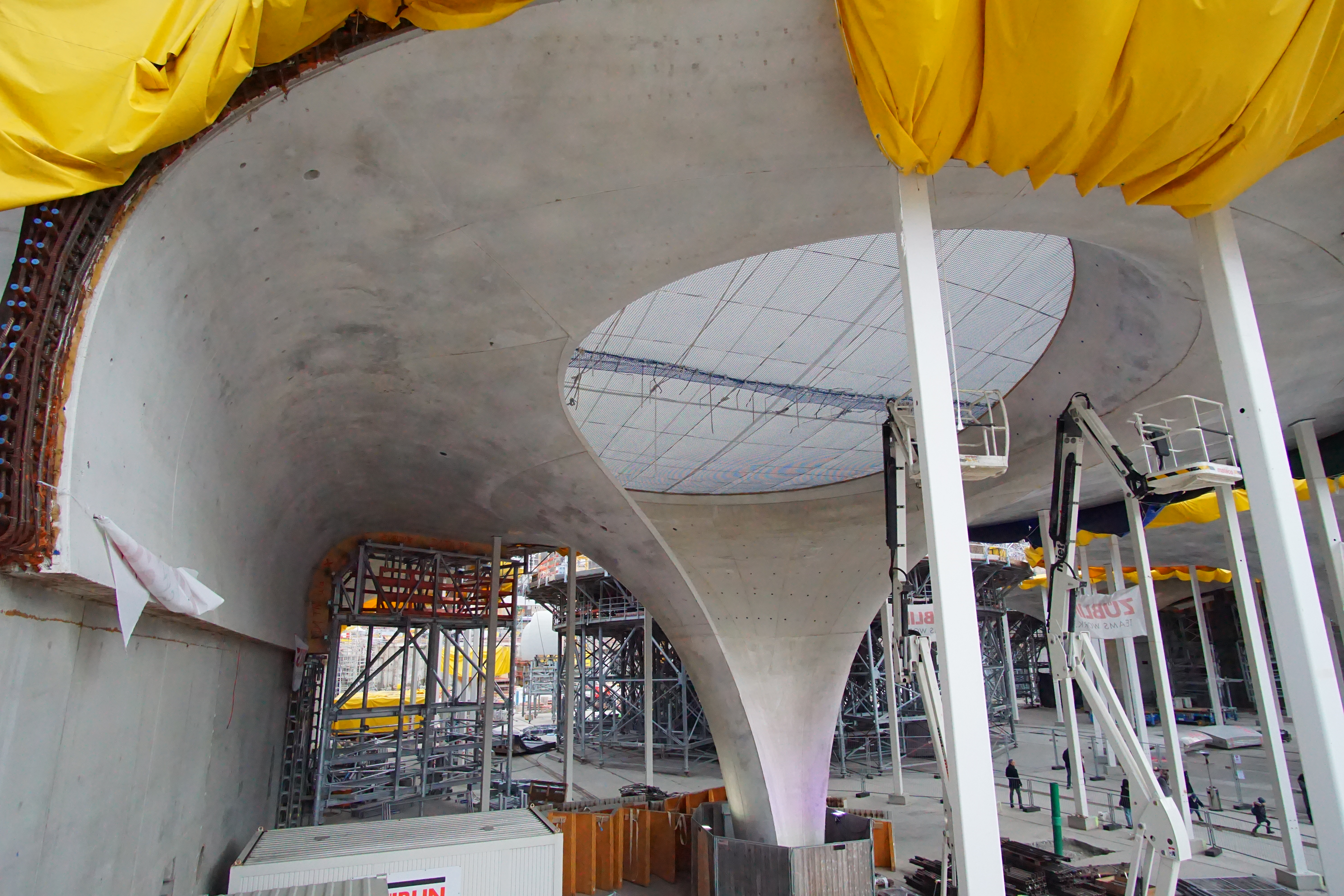 Tag der offenen Baustelle, Baugrube am Hauptbahnhof Stuttgart.